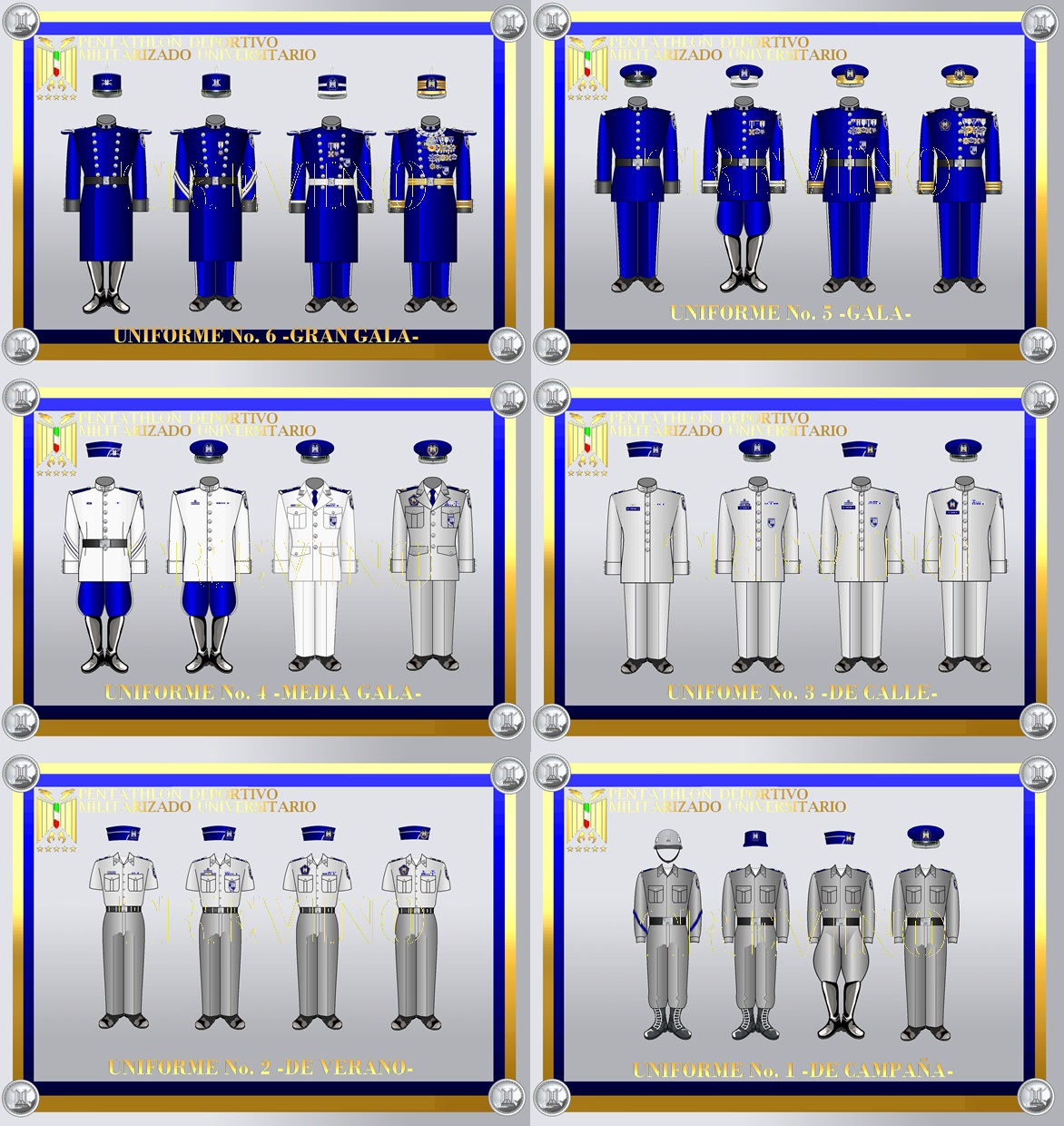 Uniformes del Pentathlon Deportivo Militarizado Universitario 1 al 6